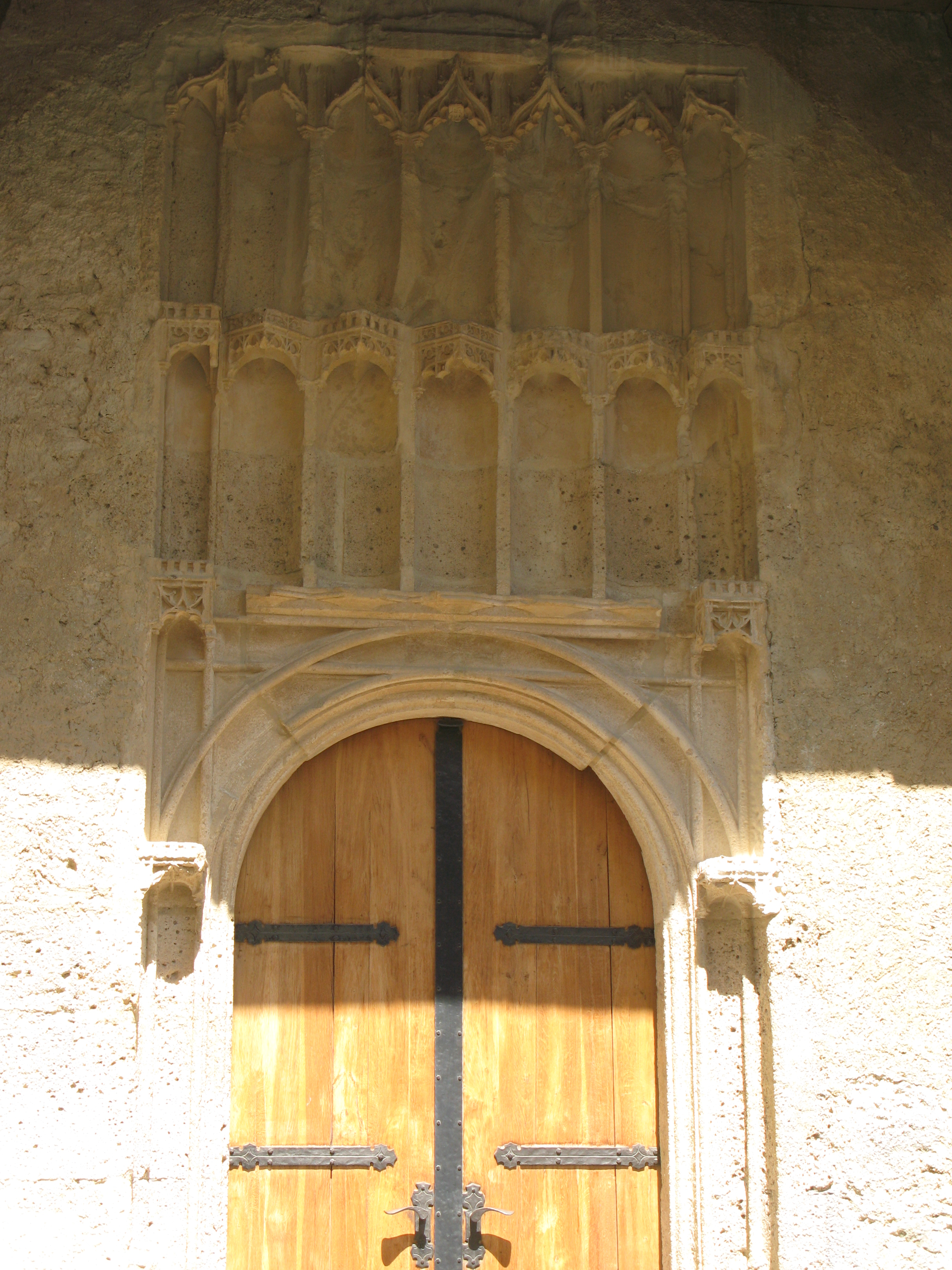 Ehemalige Dominikanerinnenkirche St. Peter an der Sperr, jetzt Museum in Wiener Neustadt.